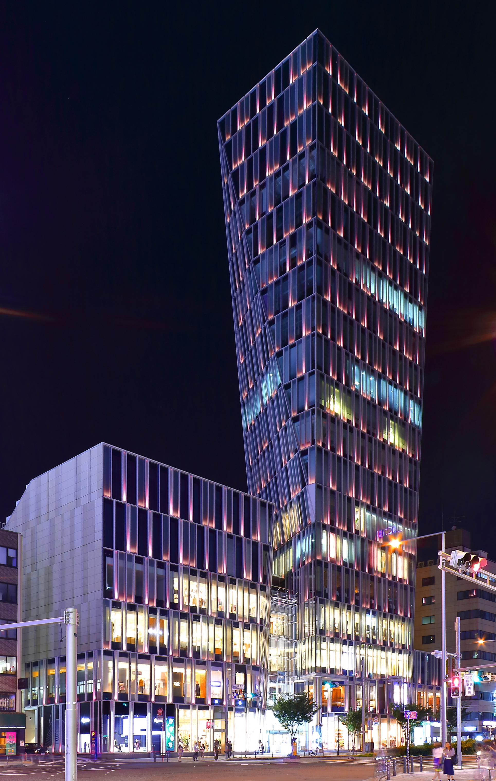 Aoビル（東京都港区）